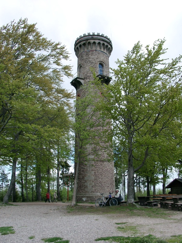 Das Bild zeigt den Aussichtsturm auf dem Kickelhahn bei Ilmenau.